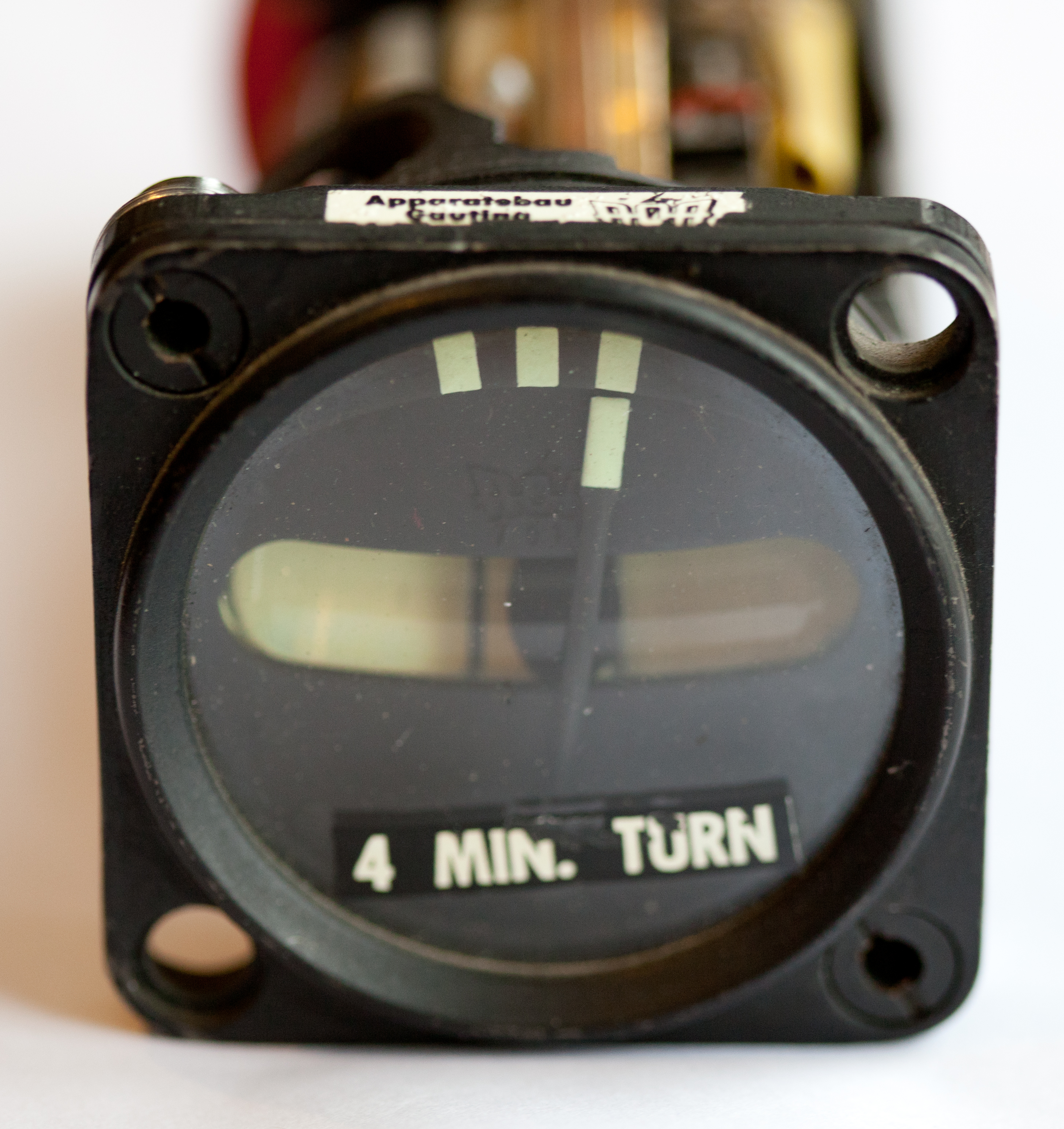 Wendezeiger